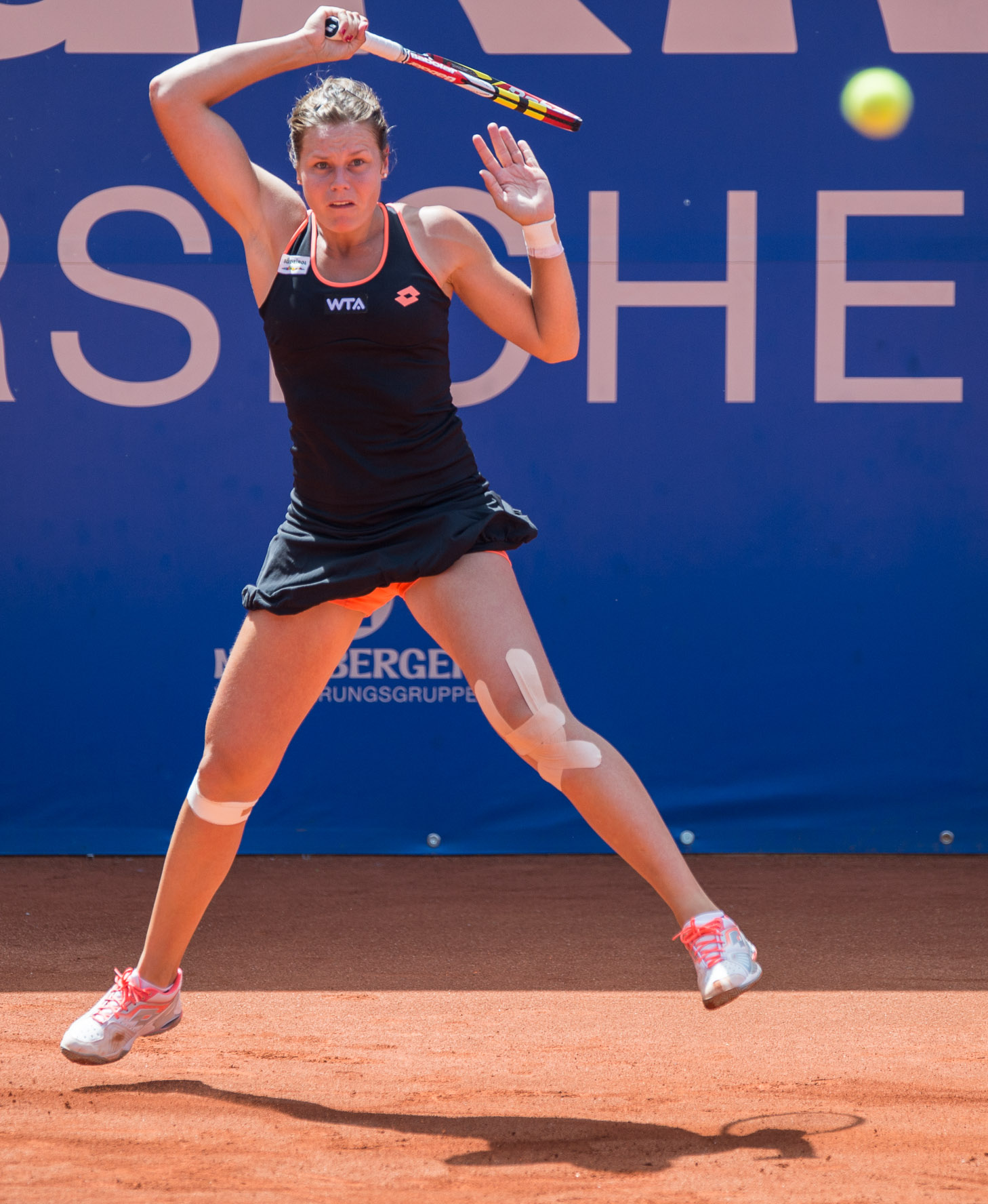 Damentennis,Karin Knapp,Nürnberger Versicherungscup 2014,Tennis,WTA